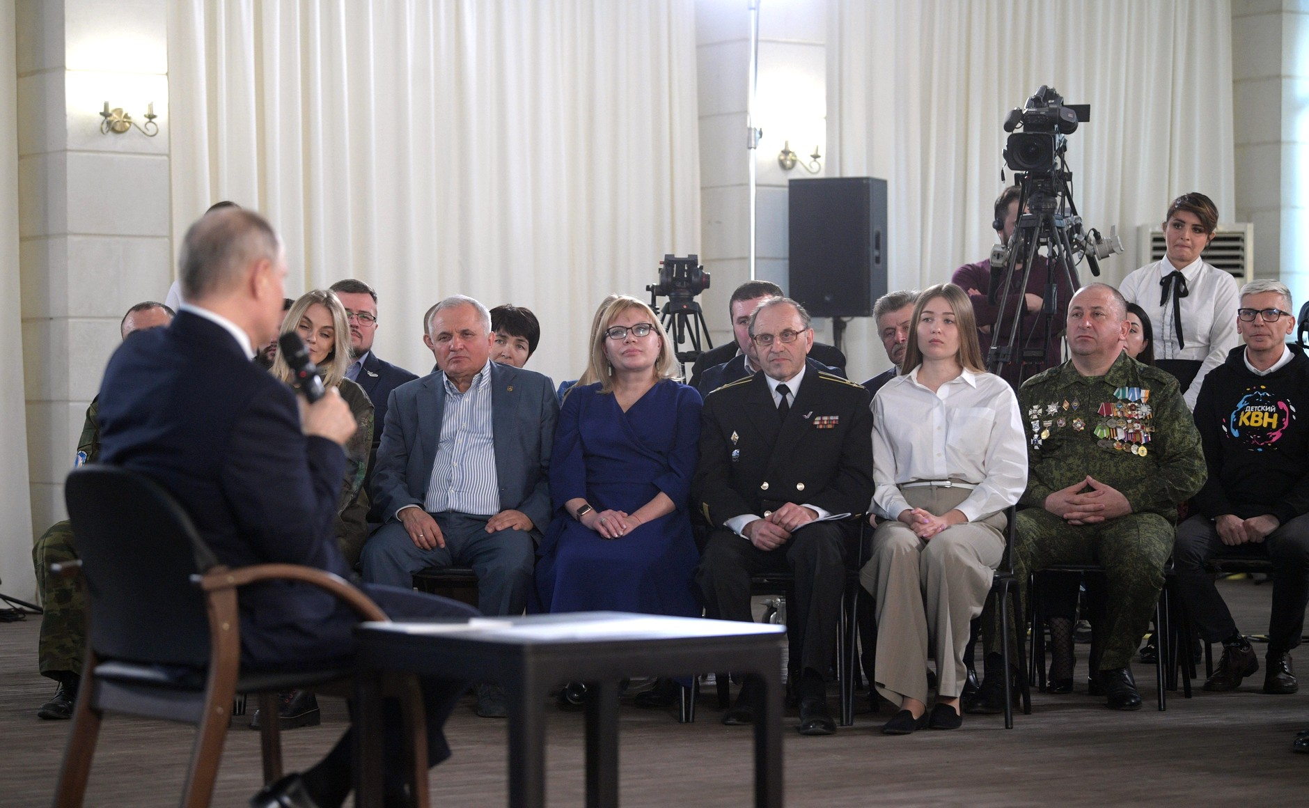 На встрече с представителями общественности Крыма и Севастополя.